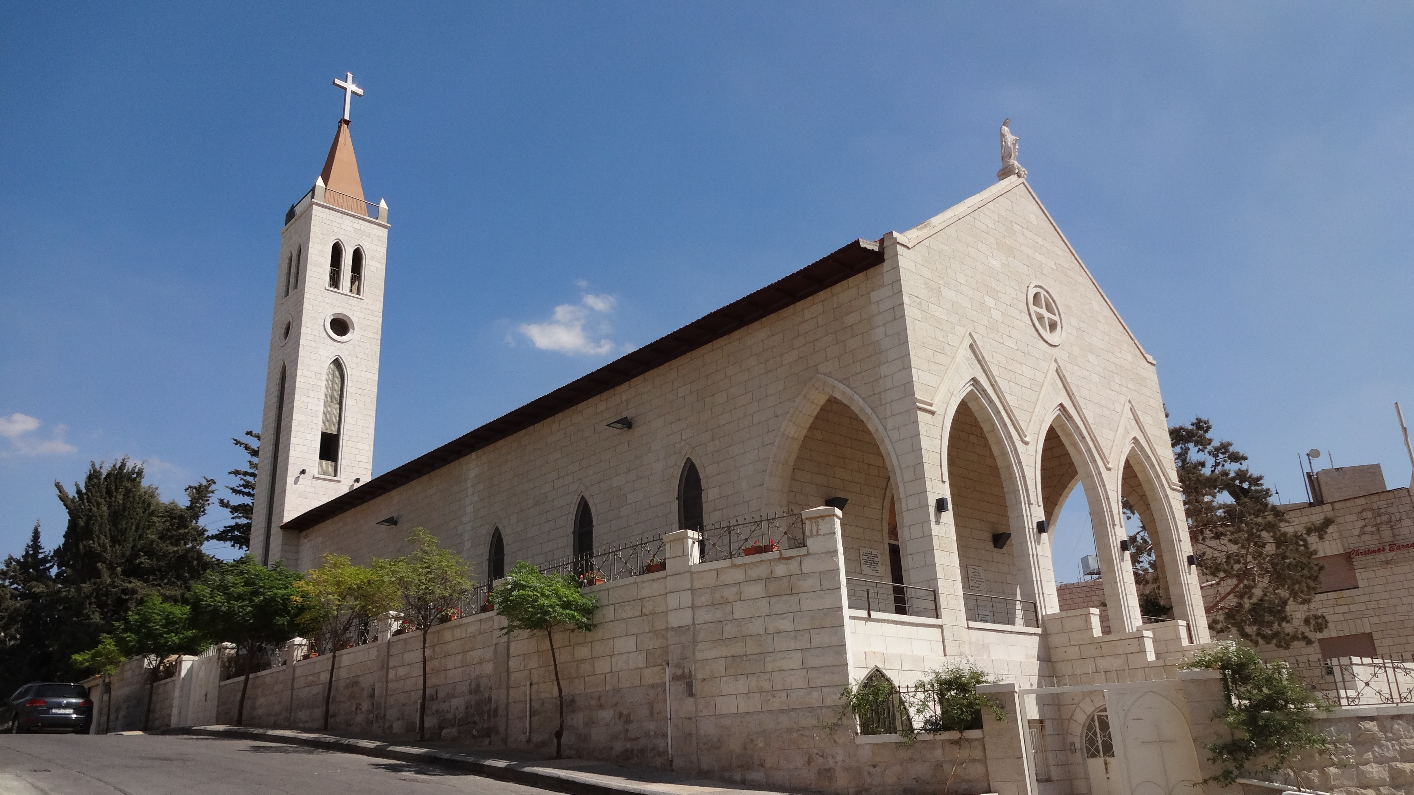 سيدة البشارة. من معالم عمان الدينية في جبل اللويبدة. 1961